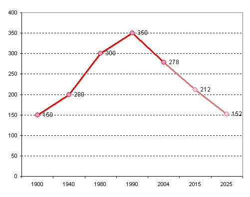 Тенденции распространения русского языка в XX веке и в первой четверти XXI века (оценка и прогноз)